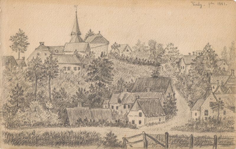 croquis réalisé avant la construction de la ligne Laon-guise-Le Cateau